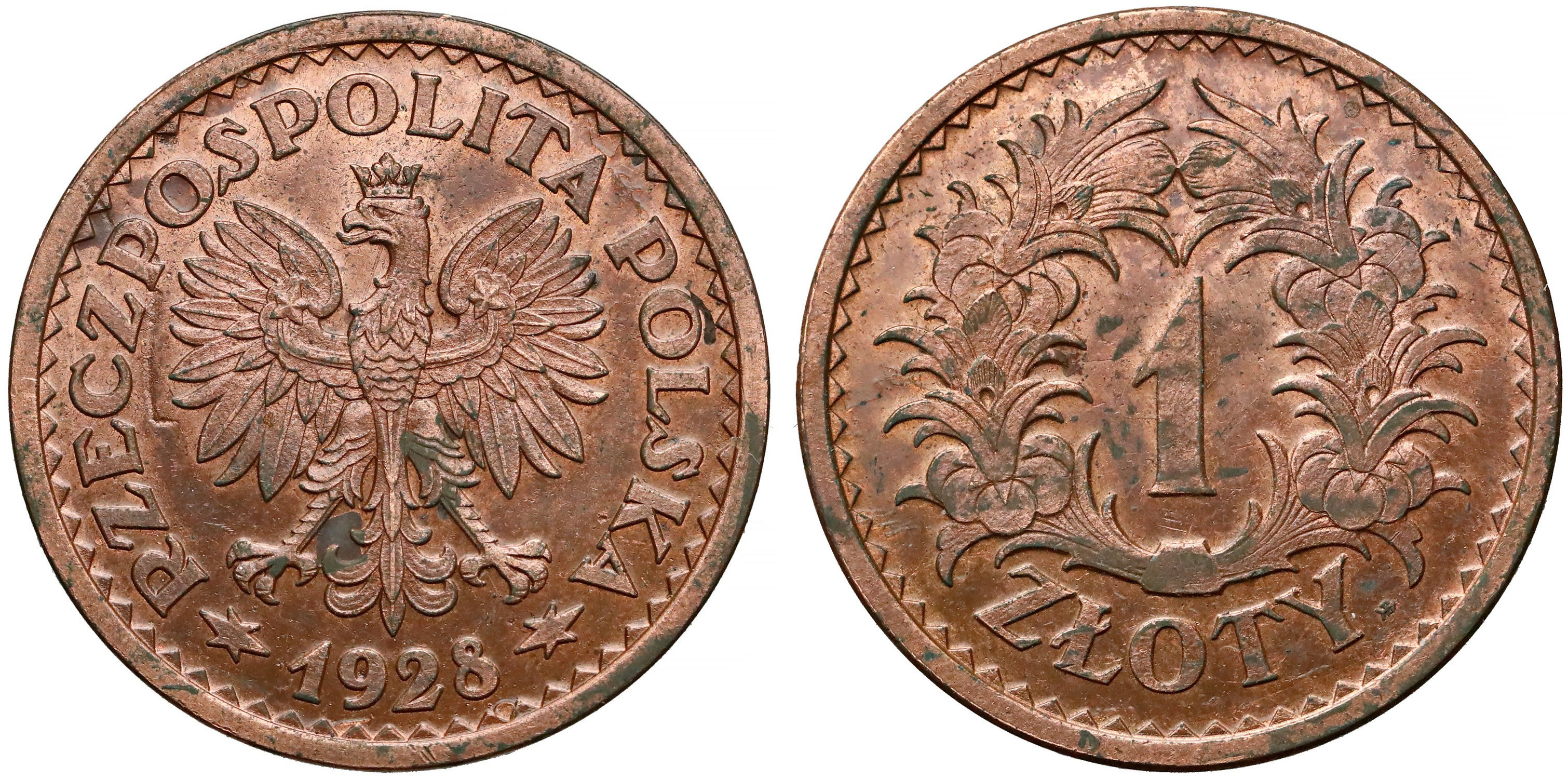 PRÓBA 1 złoty 1928 wieniec liściasty przewiązany miedź